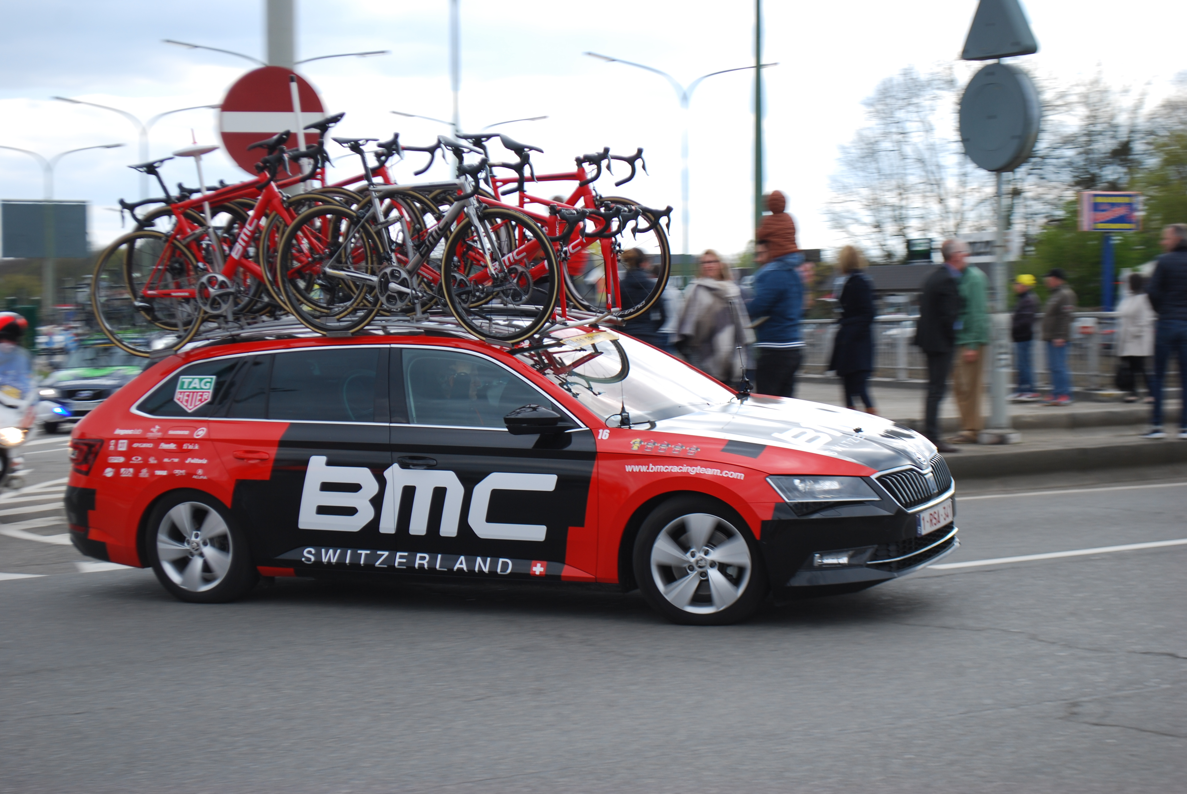 Vue de la course cycliste Liège-Bastogne-Liège 2017 à Boncelles.